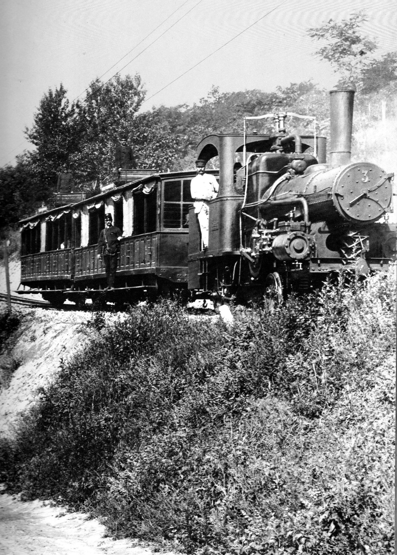 Budapest Városmajor